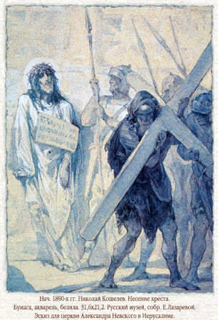 Эскиз для картины «Симон несёт Крест Спасителя» (1900)